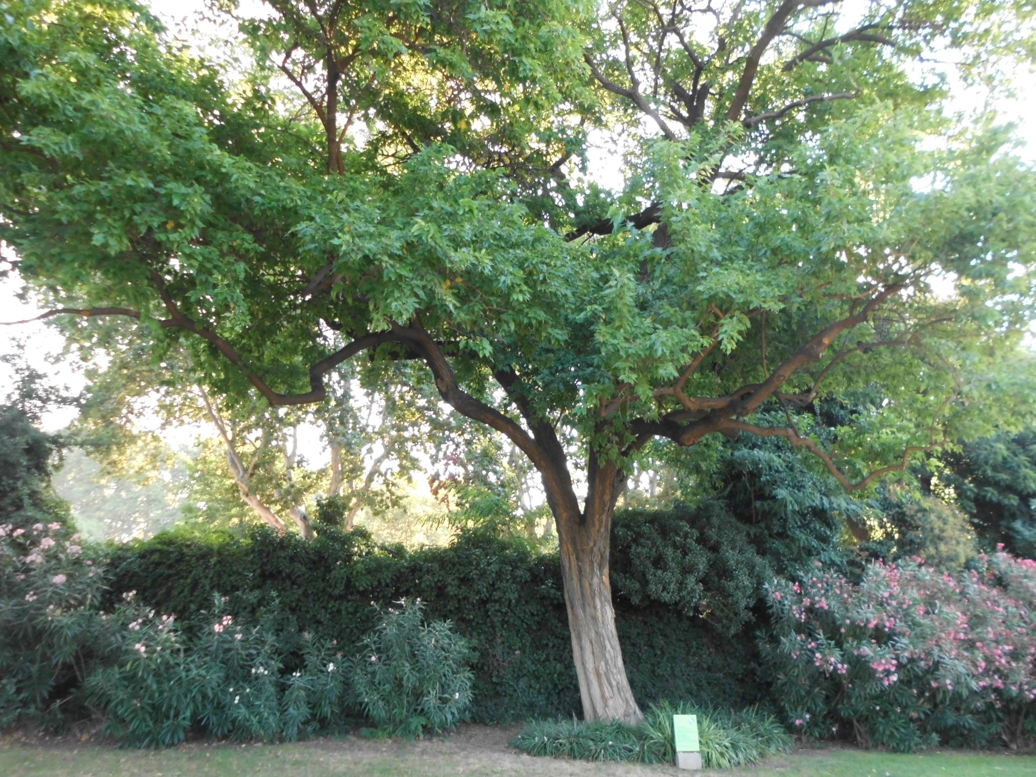 Maclura del Parc de la Ciutadella (Barcelona) This is a a photo of a protected or outstanding tree in Catalonia, Spain, with id: MA-13.911.01